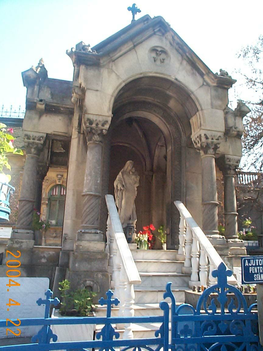 Dózsa György kivégzésének állítólagos helyén emelt Mária-szobor, Temesvár, Románia. Kiss György (1852–1919) alkotása